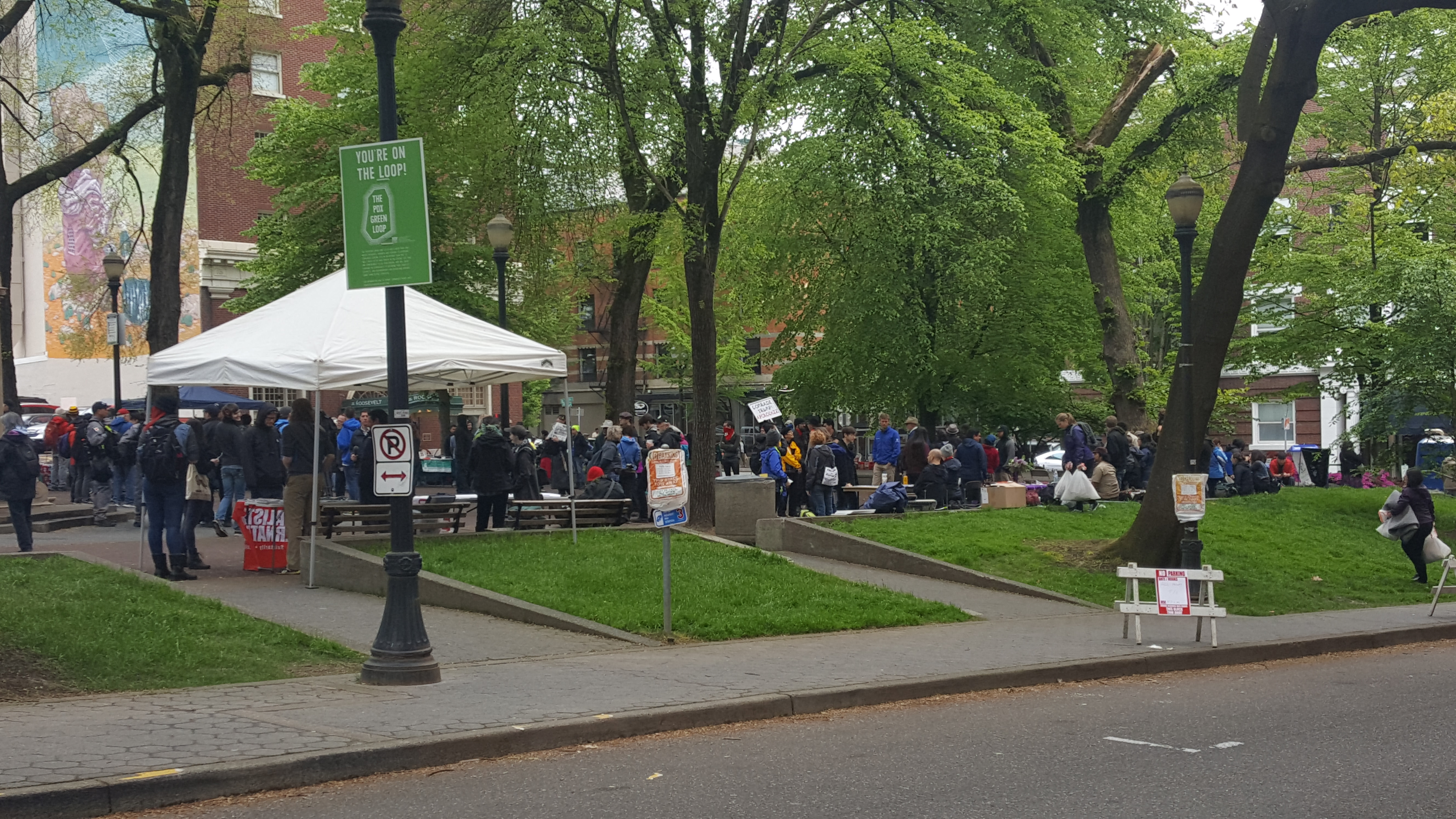 May Day rally, PDX, 2017